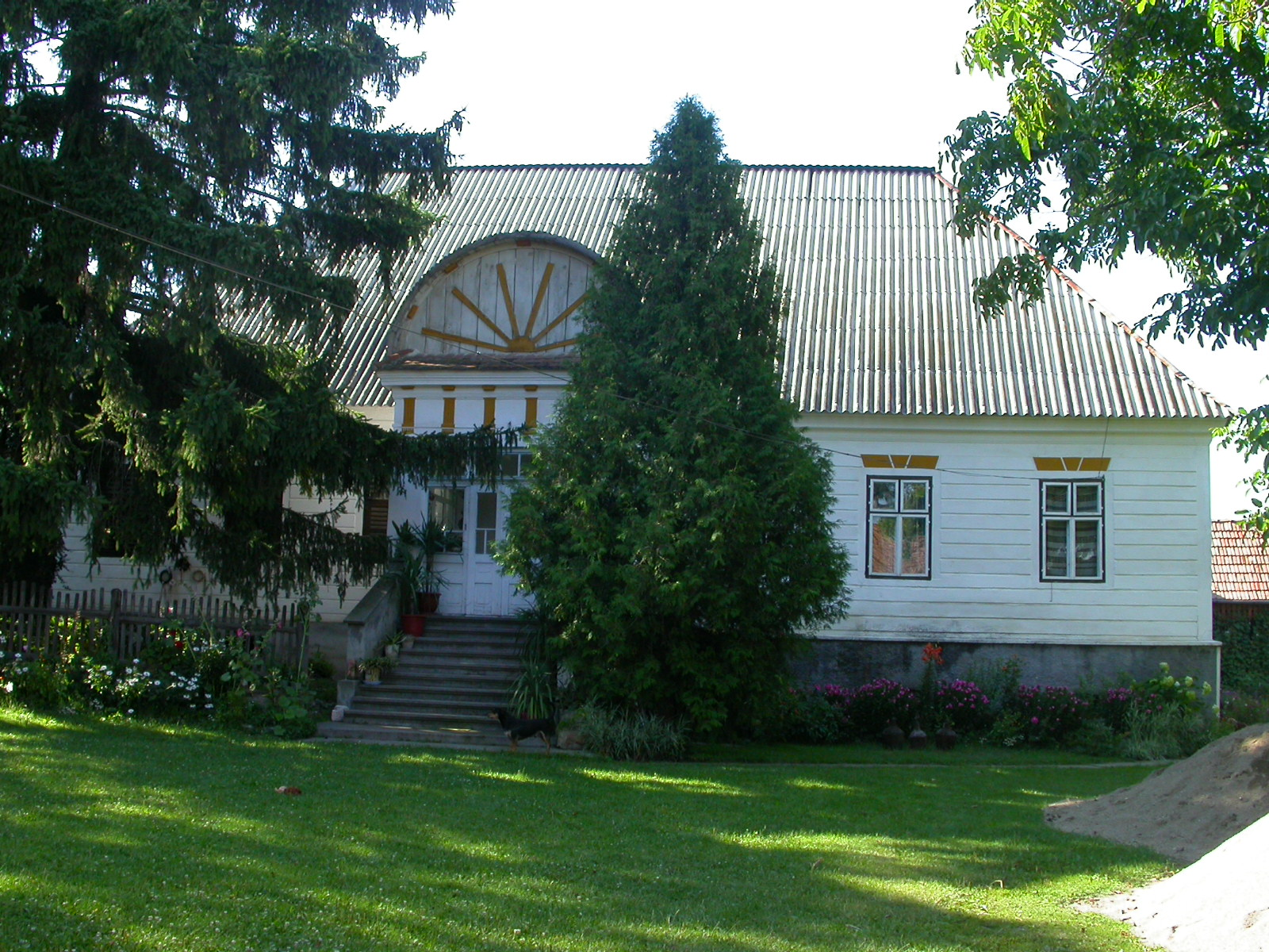 Conacul Damokos - Cseh, 1838